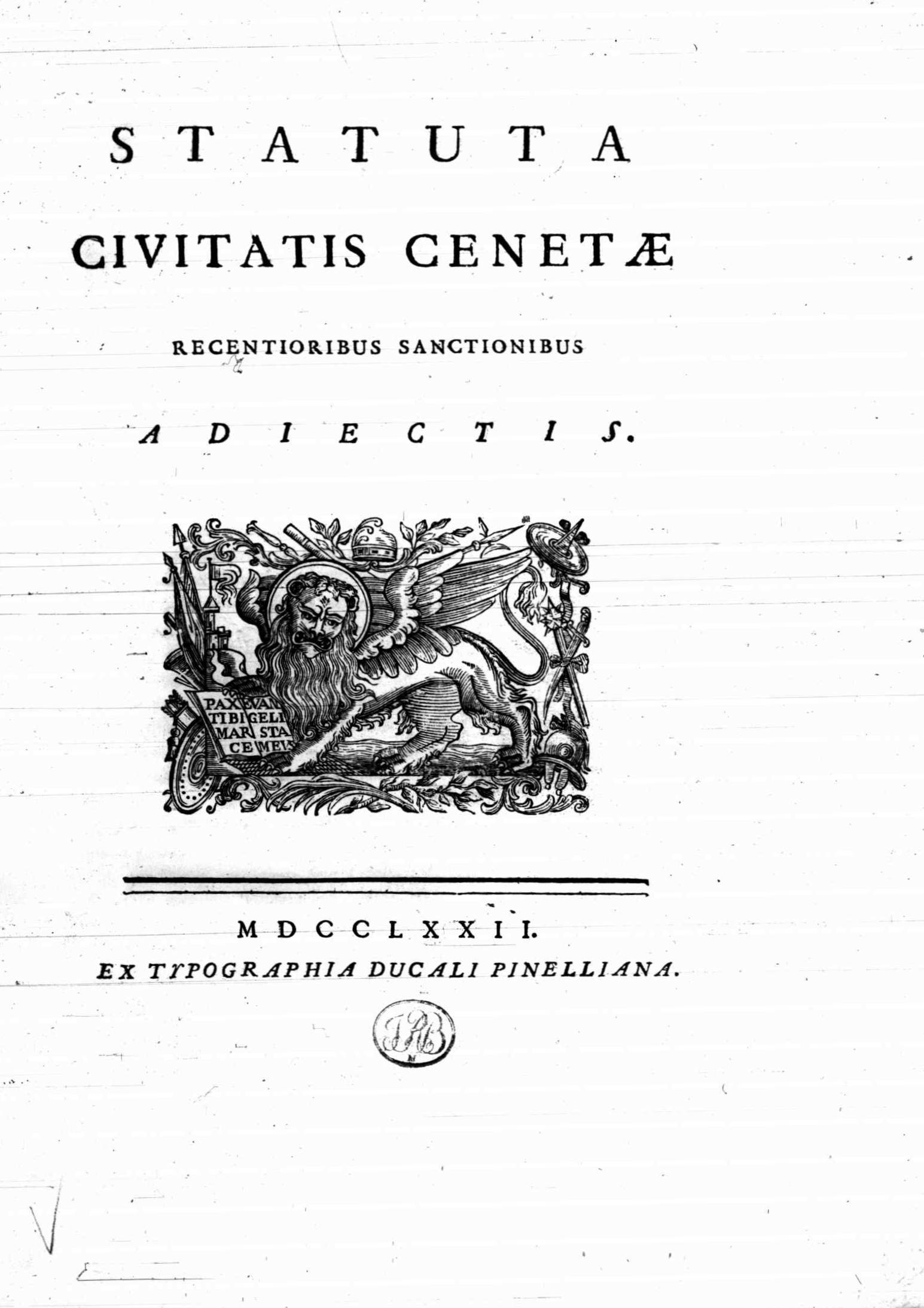 Frontespizio